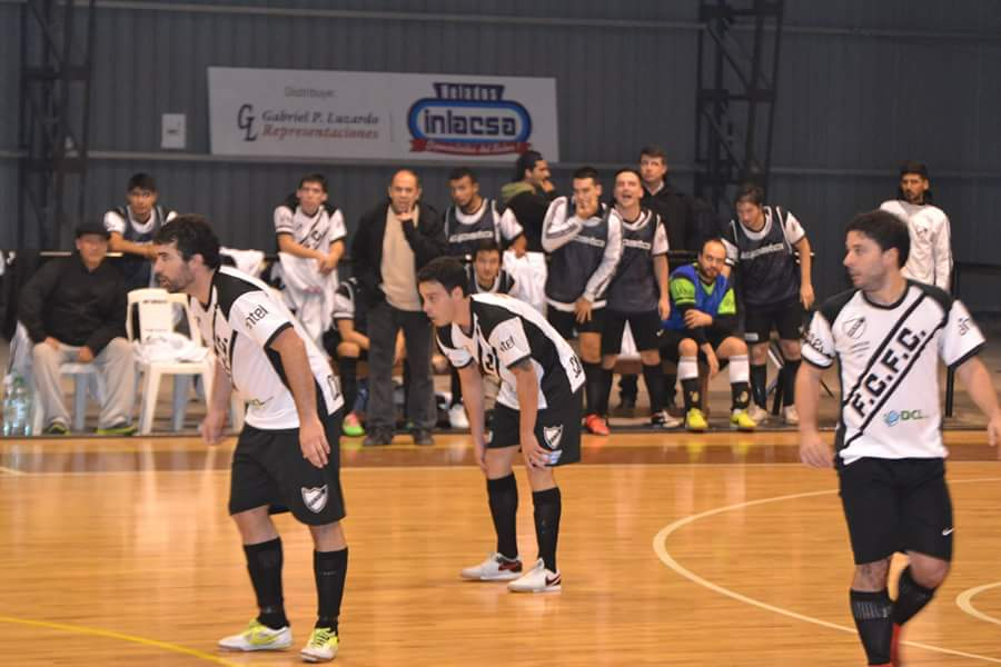 Ferro Carril en su participación en Liga Uruguaya